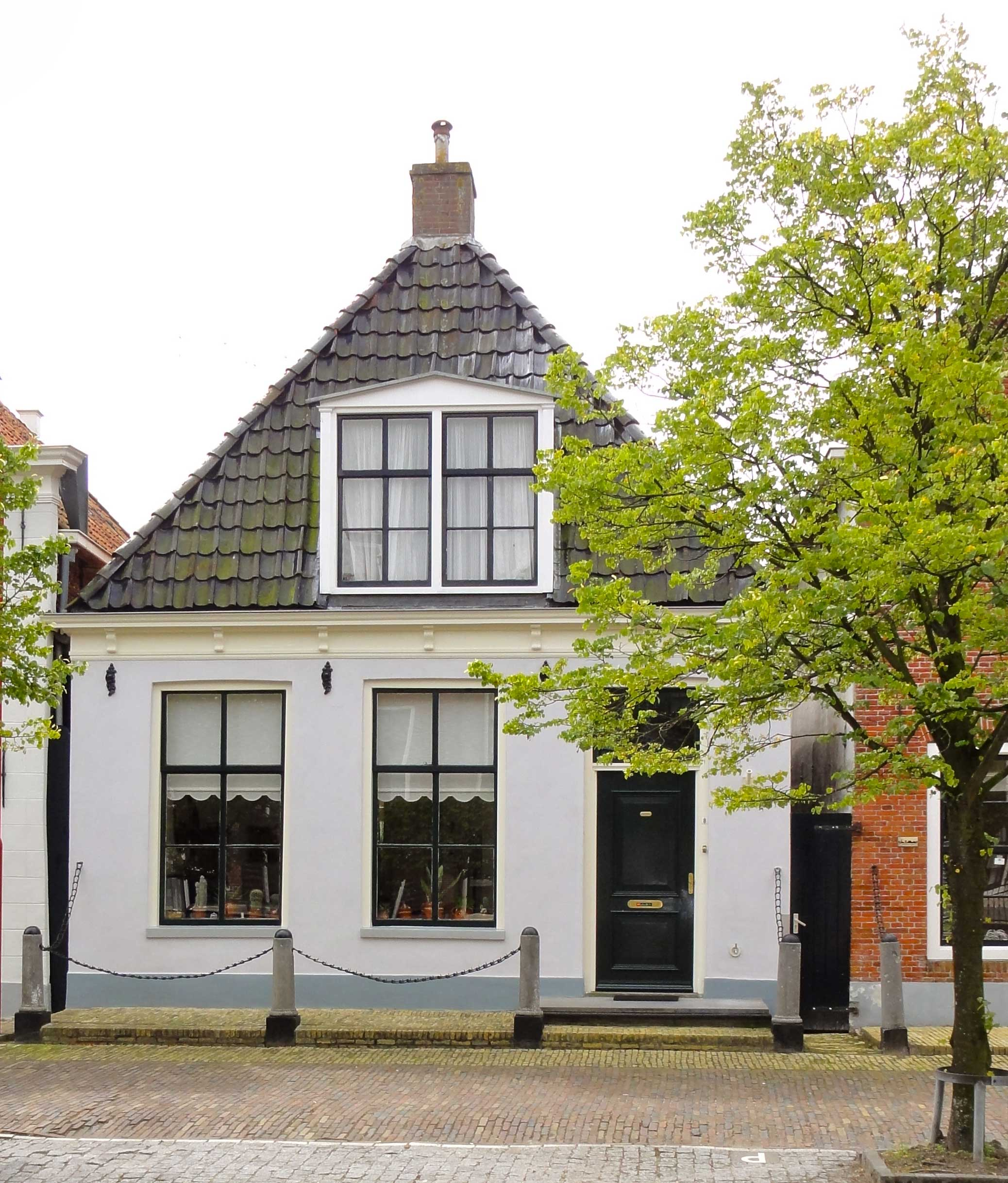 Pruikmakershoek 8 te Makkum